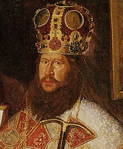 Патриарх Никон